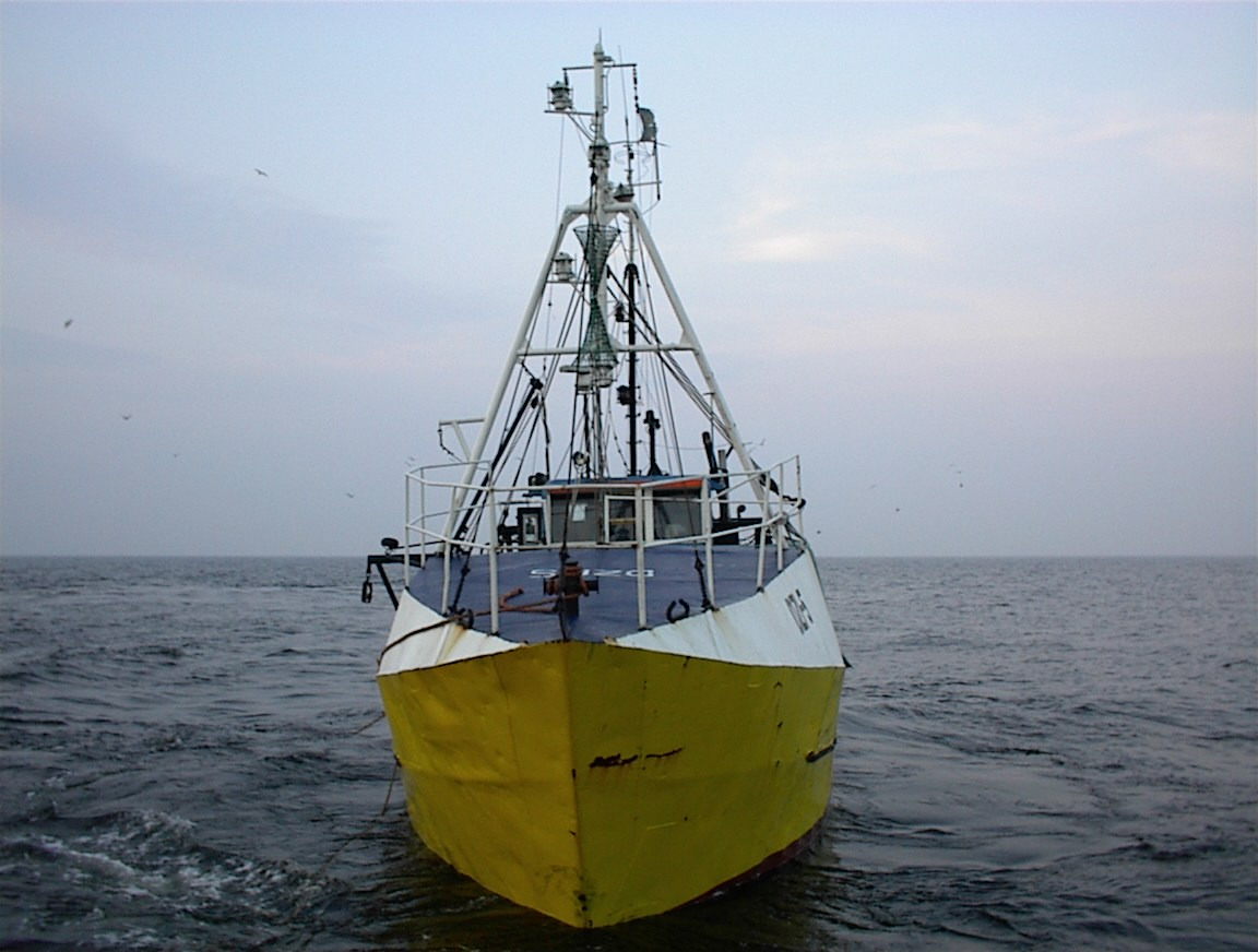 Kutter DZI-S Storem